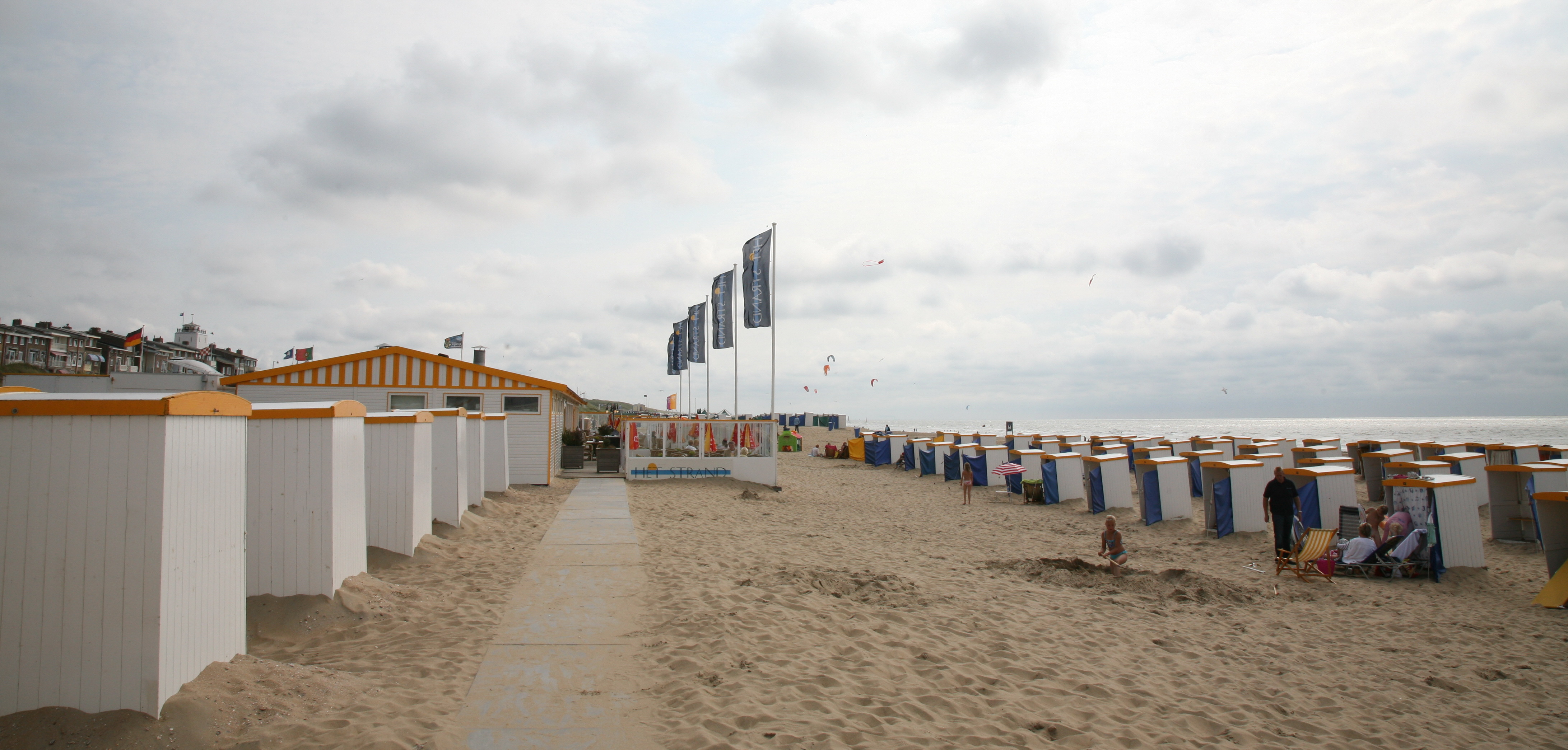 katwijk holland (62)